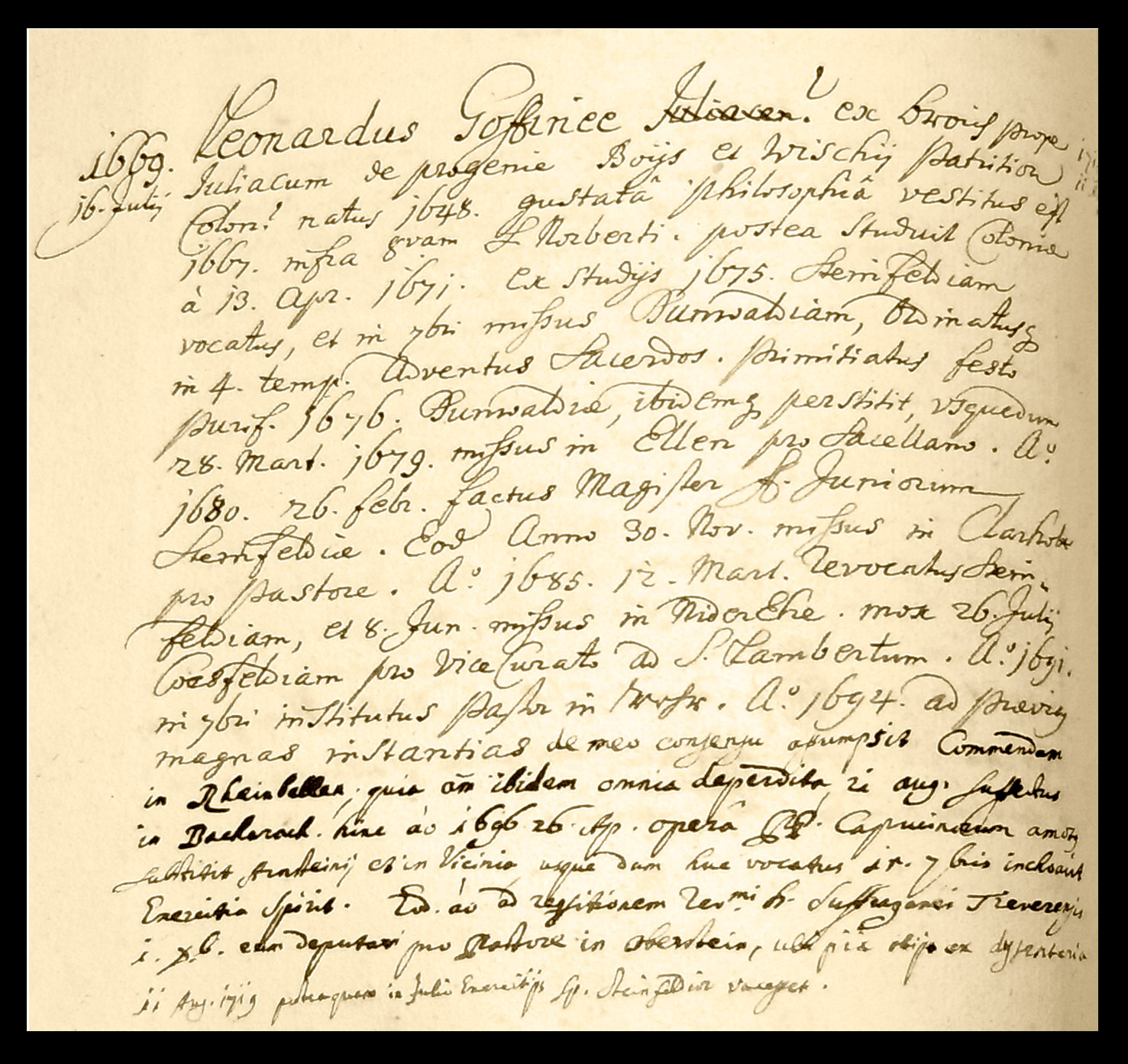 Facsimile einer Seite aus dem Konventualenverzeichnis des Klosters Steinfeld